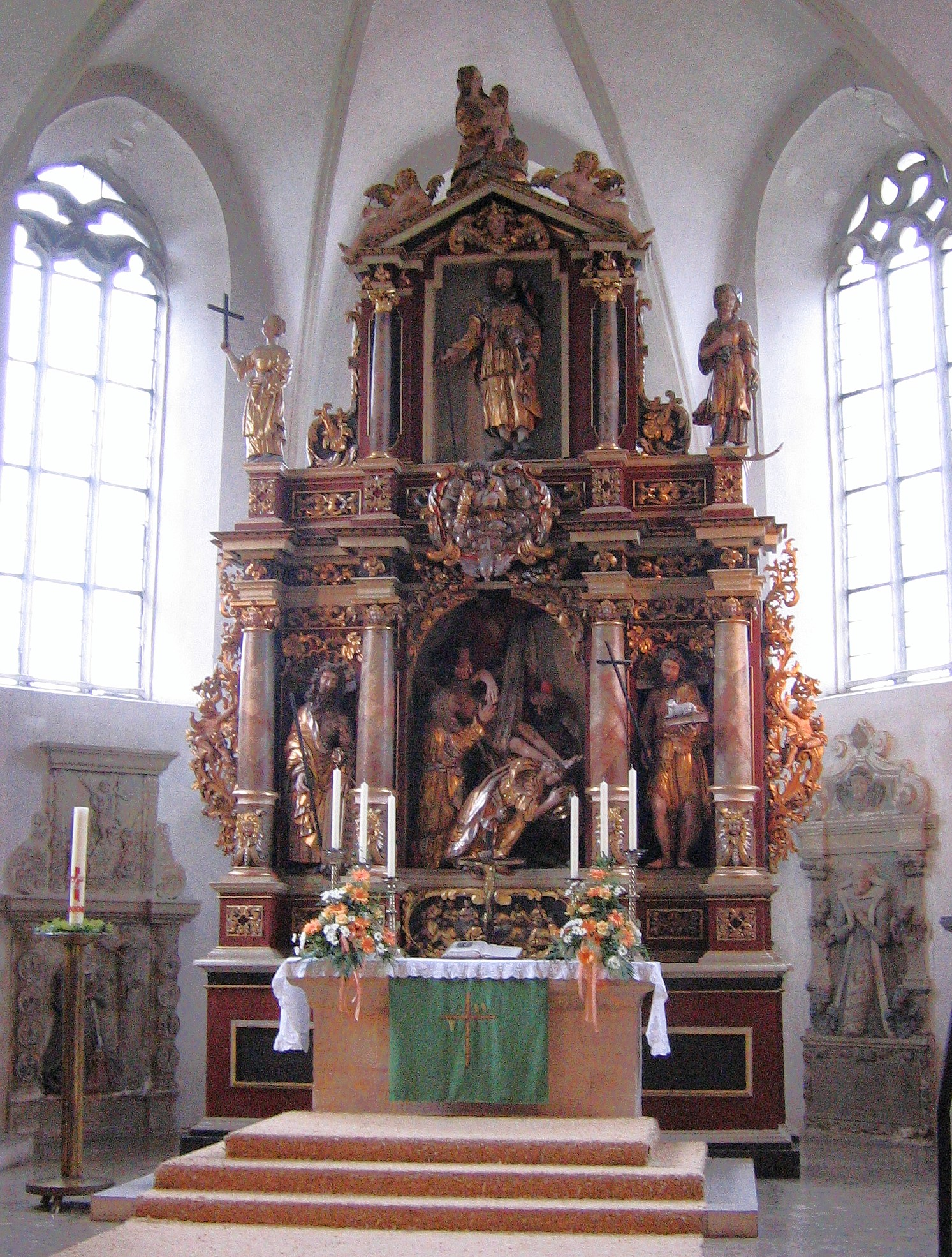 Altar der Pfarrkirche St.Jakobus in Creussen bei Bayreuth